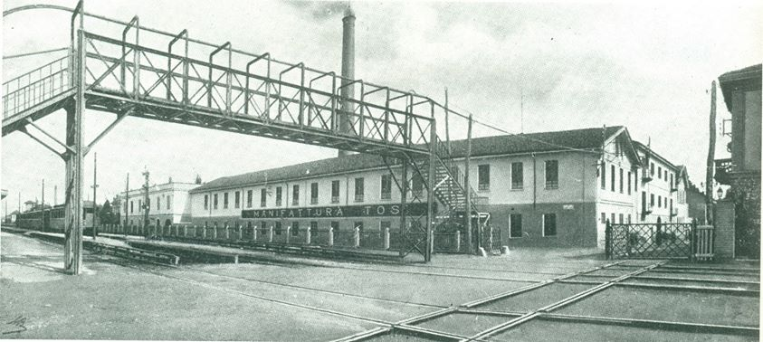 Il viale della Gloria di Busto Arsizio quando ancora era sede dei binari della ferrovia. Si vedono, perpendicolari ai binari ferroviari, quelli della tranvia Milano-Gallarate che correva in via XX settembre.